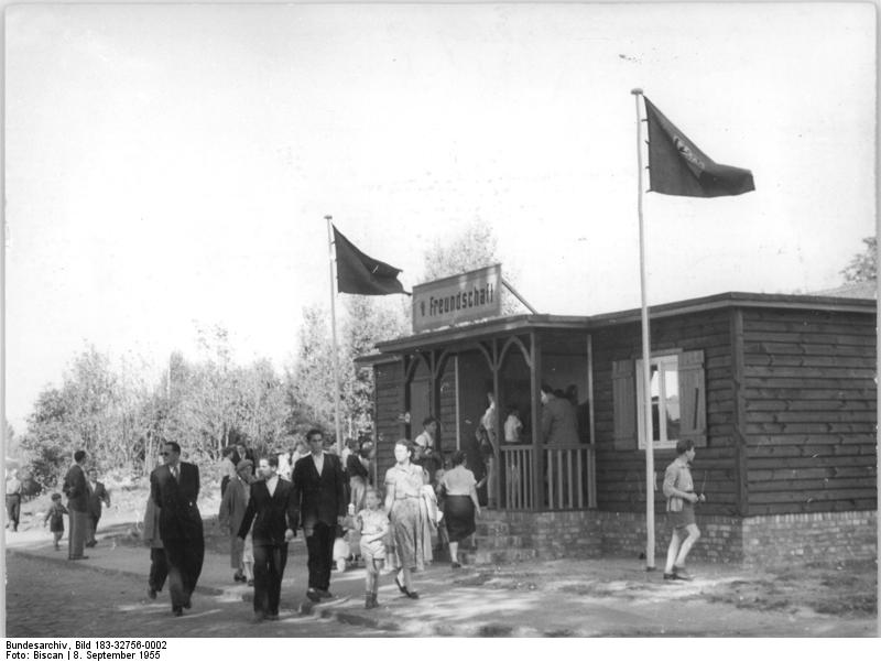 Zentralbild-Biscan 8.9.1955 Pionier-Eisenbahn in Magdeburg in Betrieb genommen Der erste, 500 m lange Streckenabschnitt der Pioniereisenbahn in Magdeburg wurde kürzlich in Betrieb genommen. In etwas mehr als zwei Wochen wurde dieser erste Bauabschnitt von Angehörigen der Deutschen Reichsbahn und freiwilligen Helfern aus den Reihen der Jungen Pioniere, der Jugend, der Kasernierten Volkspolizei und der Werktätigen geschaffen. Den Bau der Bahn verdankt die Magdeburger Jugend der Initiative der Sozialistischen Einheitspartei Deutschlands. UBz. Der Bahnhof "Freundschaft", der Ausgangspunkt der Pionier-Eisenbahn."